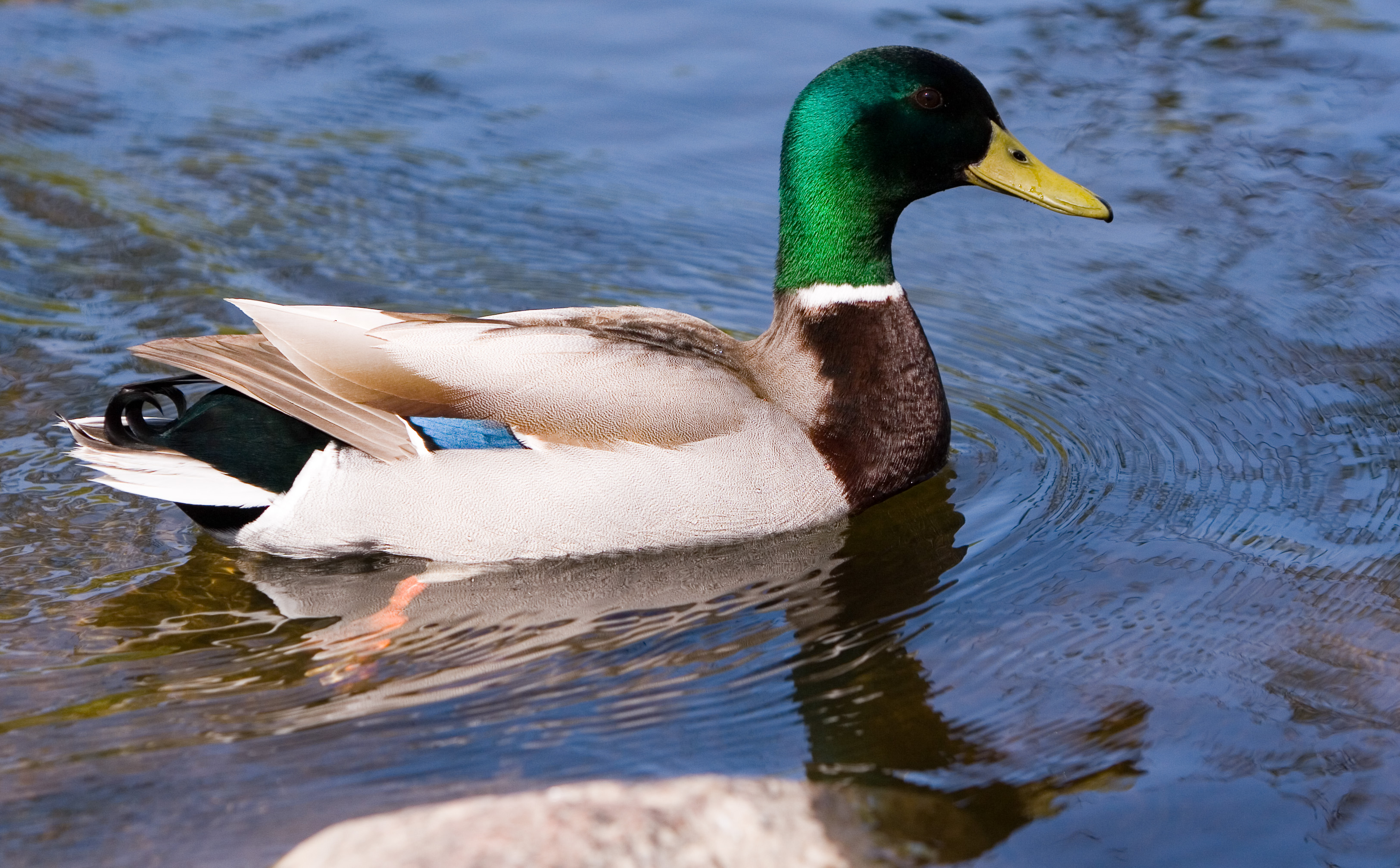 Anas platyrhynchos male swimming